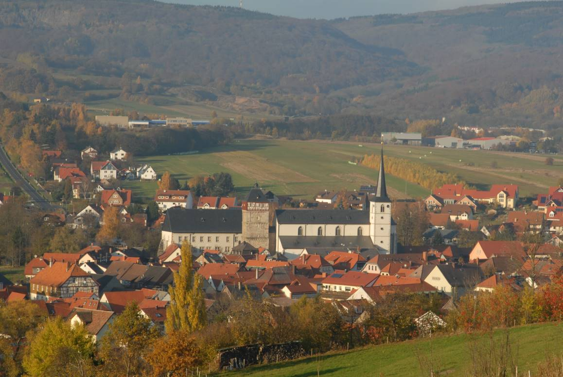 Bischofsheim, Südansicht / view from south